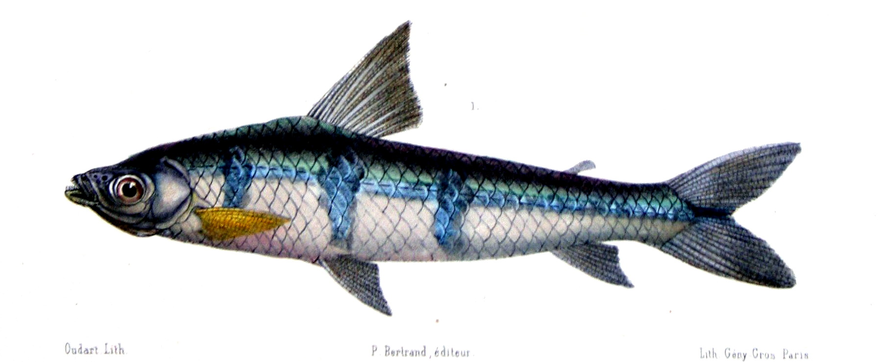 Piabuca vittata Cuv. Val. = Schizodon vittatus (Valenciennes, 1850)